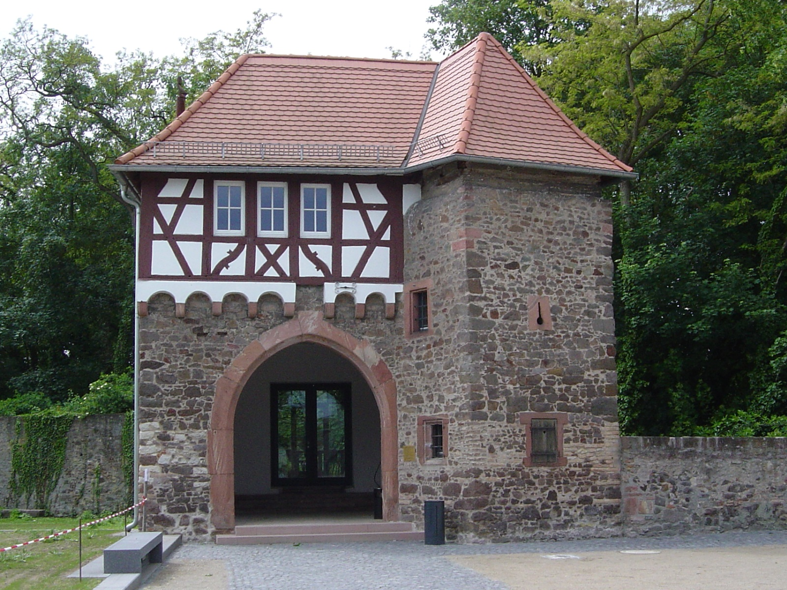 Torbau, Schloss Dornberg, Hauptstr. 1, 64521 Groß-Gerau